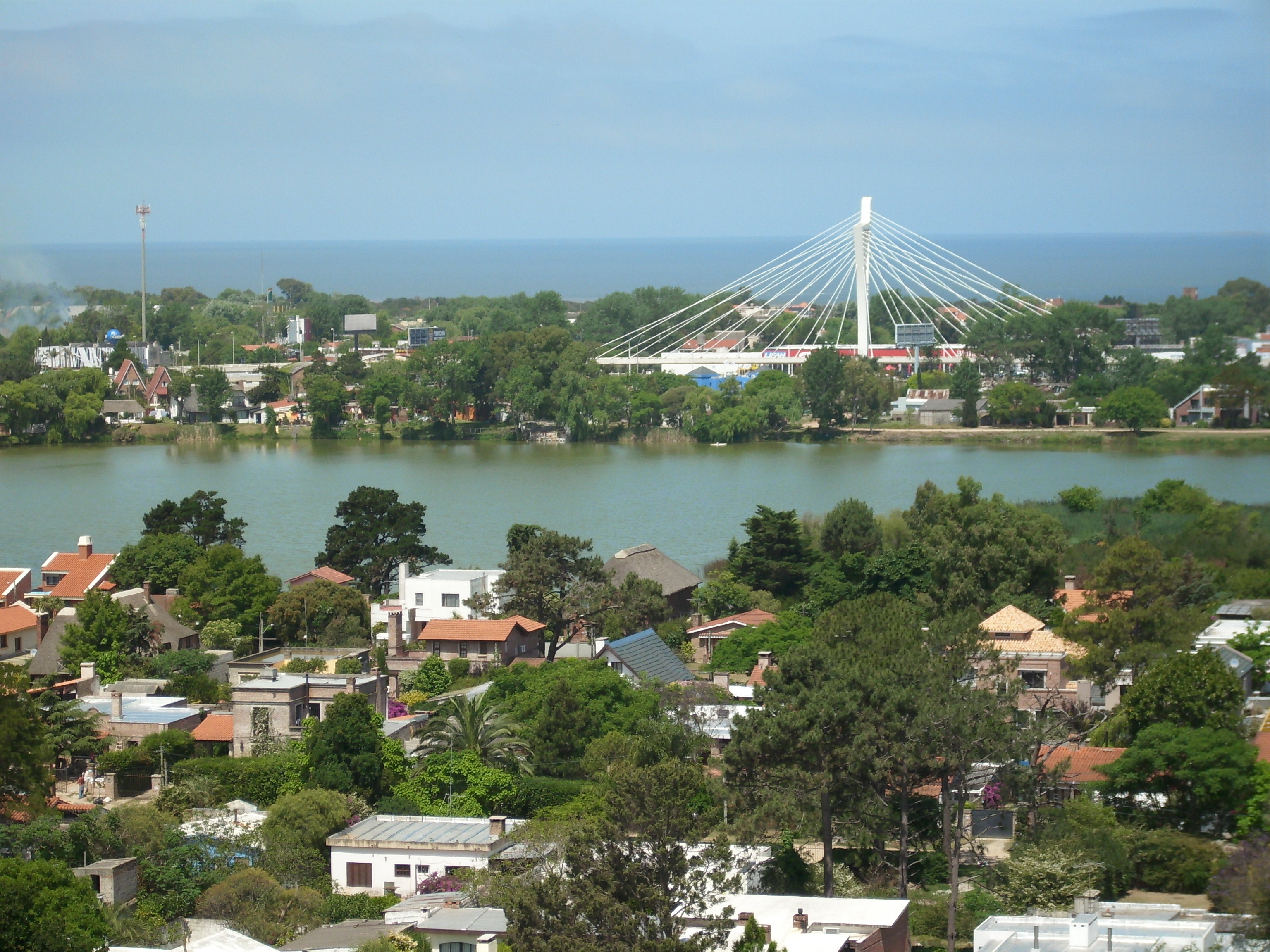 Imagem da Ponte Estaiada Das Americas, na Ciudad de la Costa, Uruguai